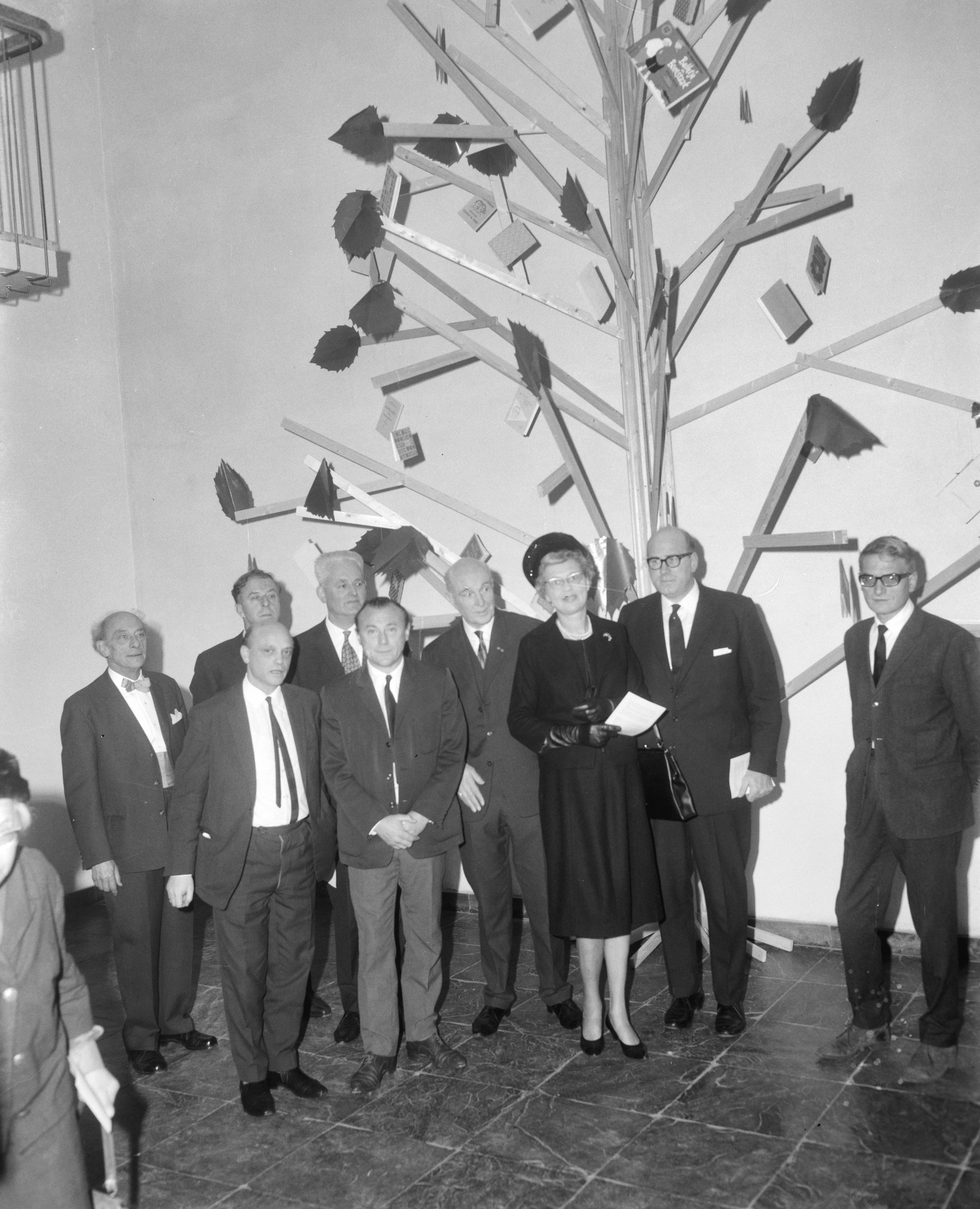 60-jarig bestaan van de Vereniging van Letterkundigen , tentoonstelling "De Boekenboom" in museum Fodor (Amsterdam) geopend. Datum 12 februari 1965. Van links naar rechts: Henk Fedder, Hans Gomperts, Manuel van Loggem, Garmt Stuiveling, Bert Schierbeek, Mattheus Verdaasdonk, mw A, dhr B, Adriaan Morriën.